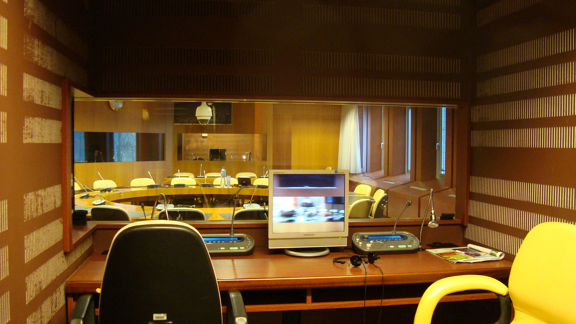 Cabine d'interprétation, salle I, BIT, Genève